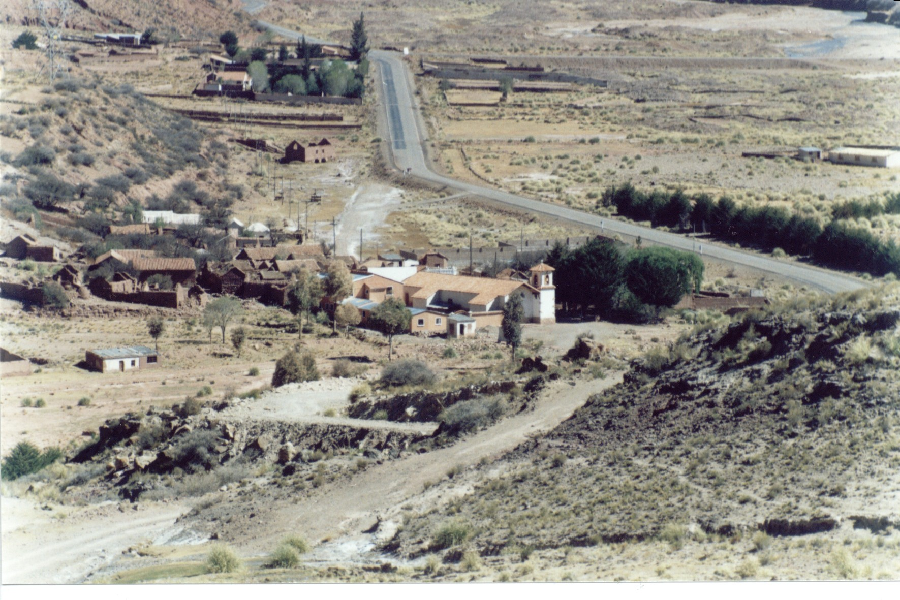 Tarapaya, Dpto. Potosí, Bolivia